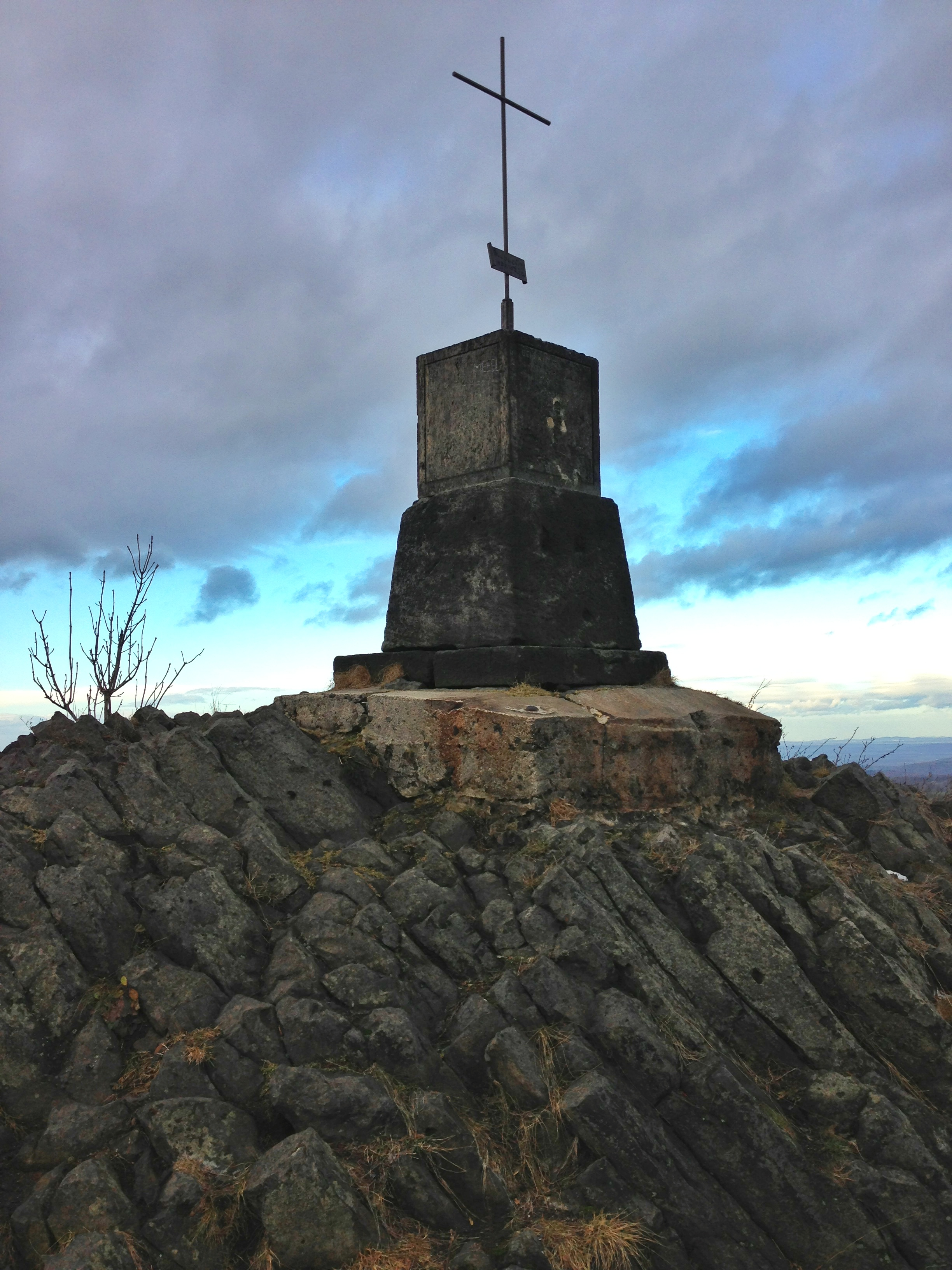 Vývěr čediče ve vrcholové partii vrchu Špičák (723 m.) poblíž Krásného Lesa v Krušných horách